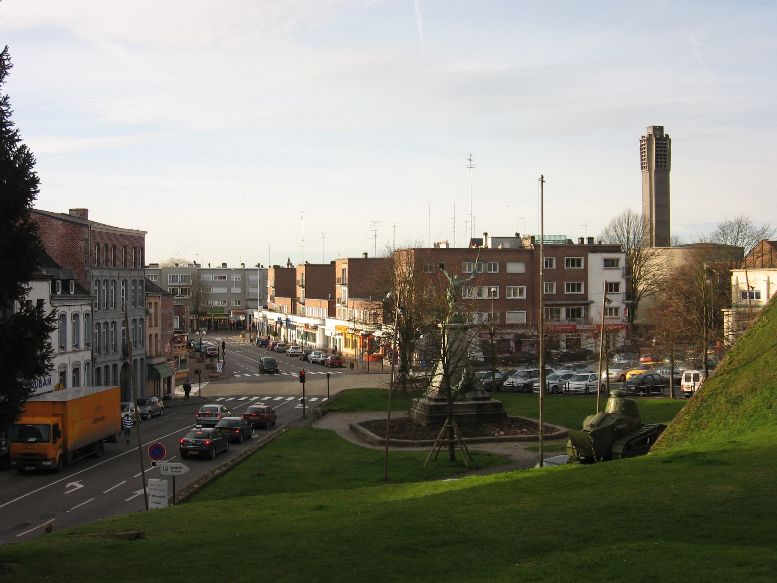 view on Maubeuge, France